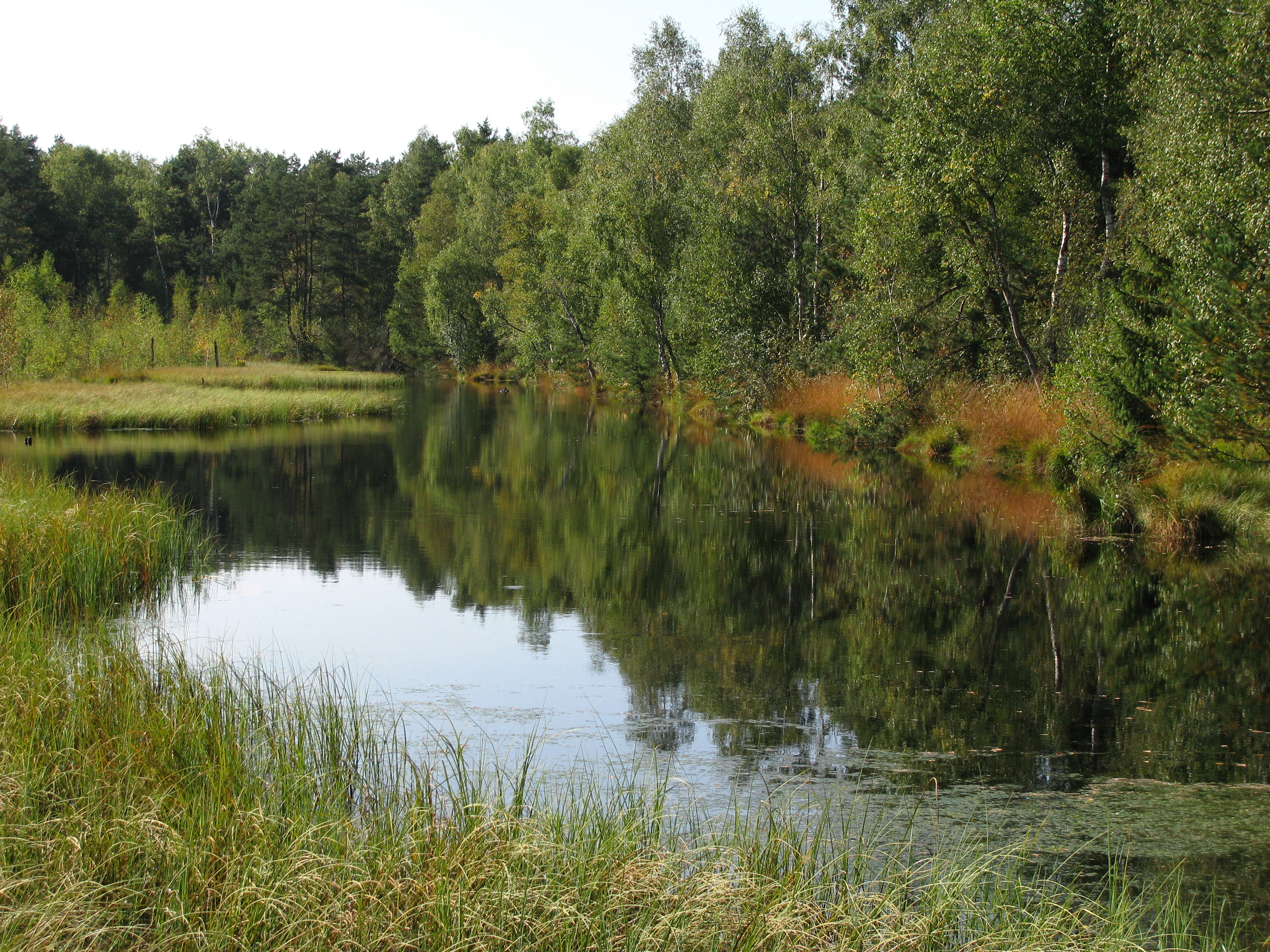 Haspelmoor